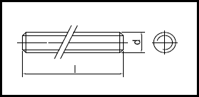 DIN 975